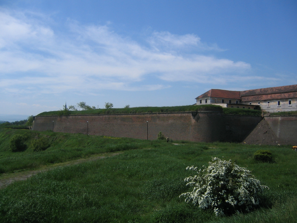 Fortificaţiile din partea de sud-est a cetăţii Alba Iulia, România